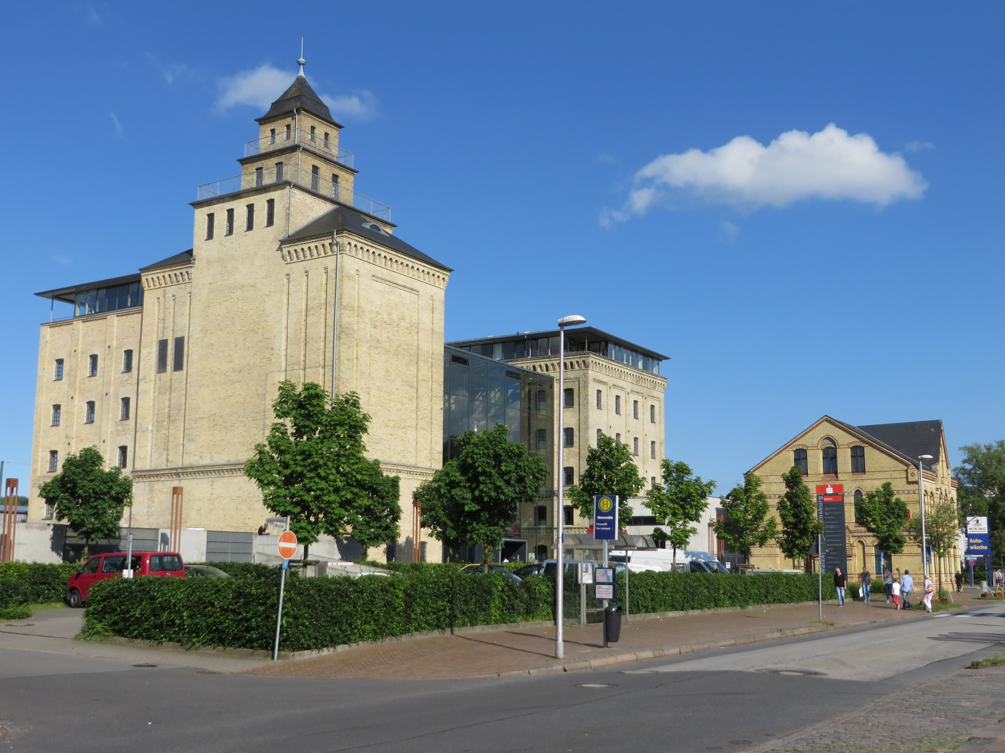 Flensburger Walzenmühle, Bild 002